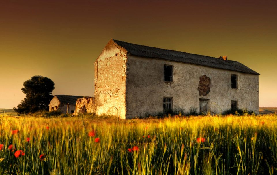 Un caserío abandonado en los grandes campos de alrededor del pueblo de La Malahá, en la provincia de Granada (España).